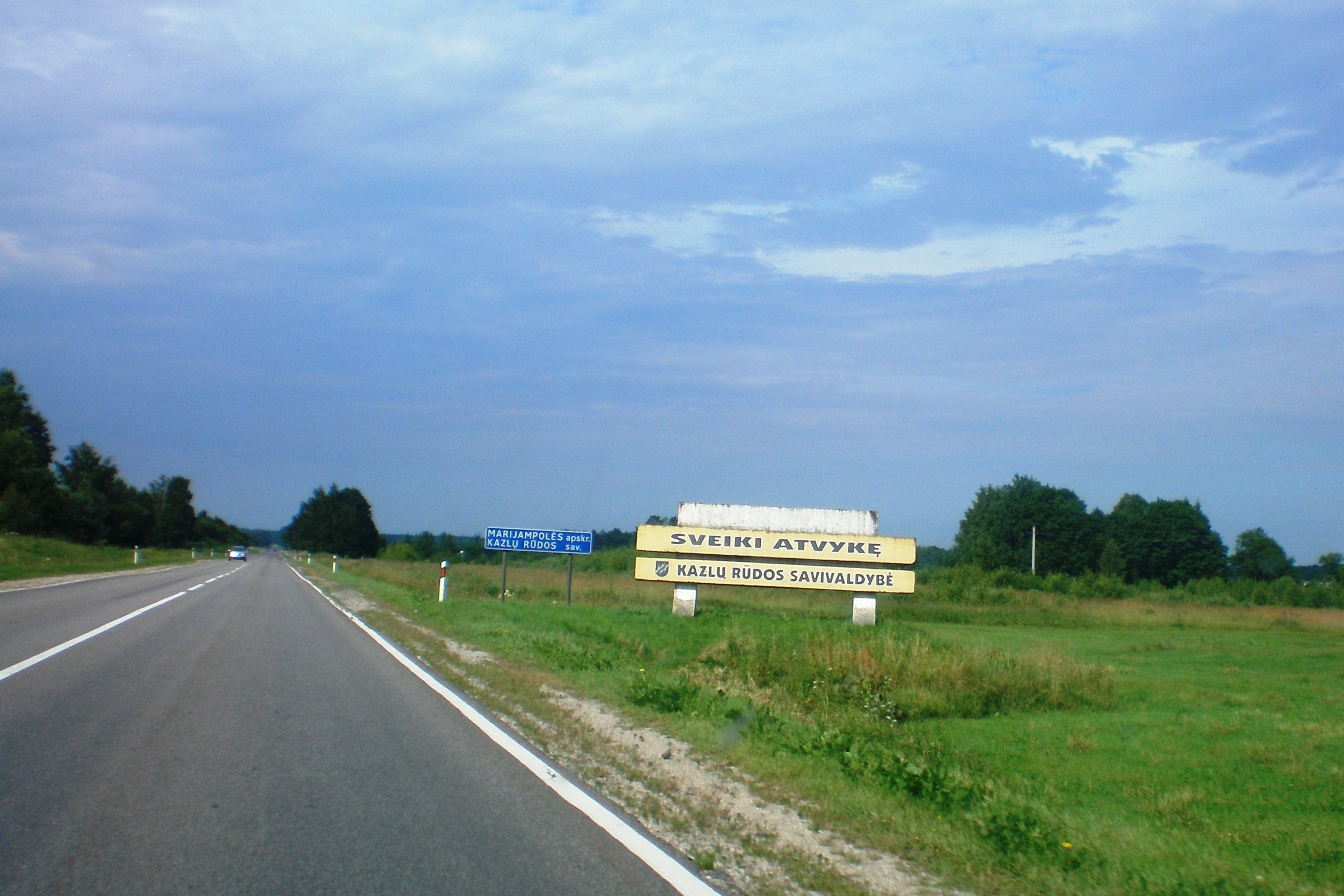 Įvažiavimas į Kazlų Rūdos savivaldybę nuo Skriaudžių